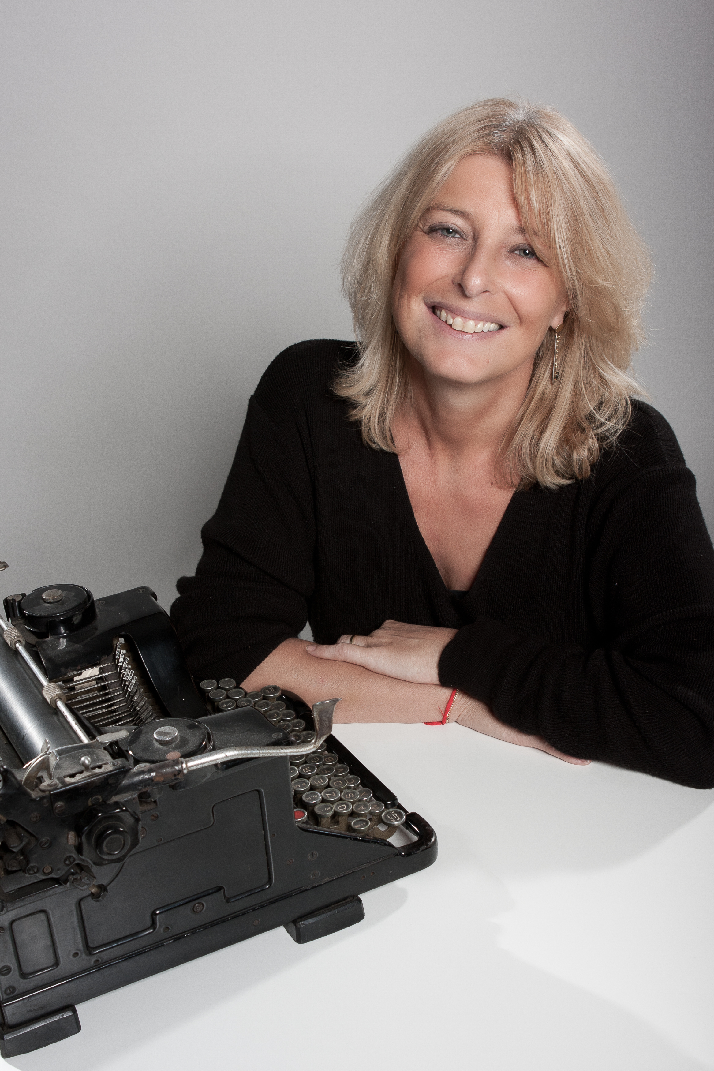 Ritratto della scrittrice Paola Staccioli